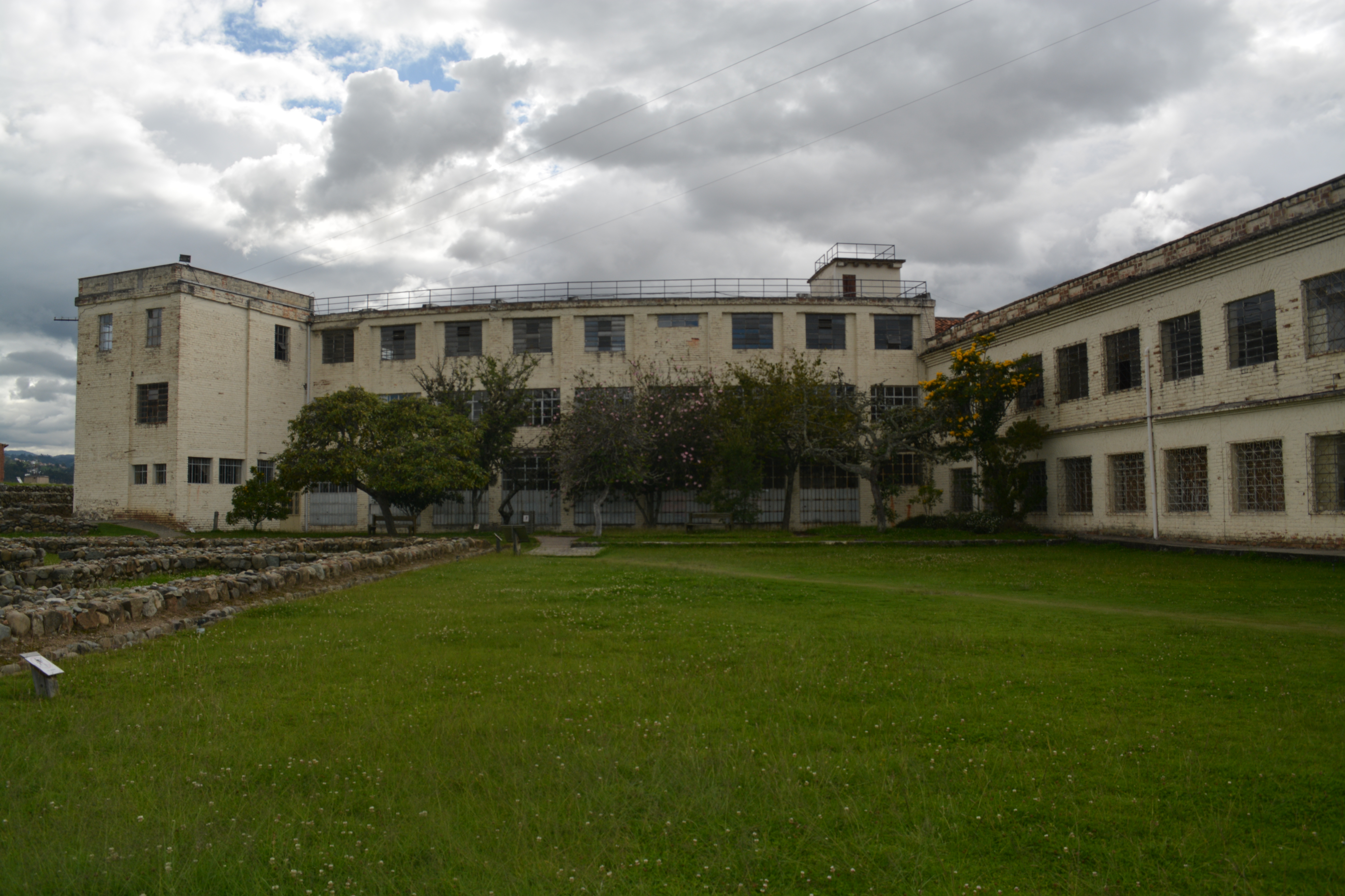 colegio